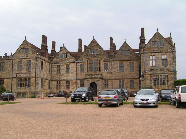 Somerhill